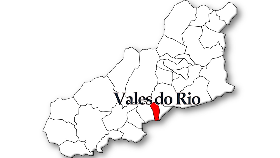 População